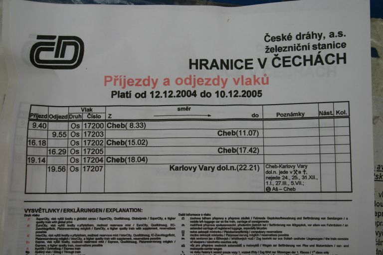 Bahnhof Hranice v Čechách